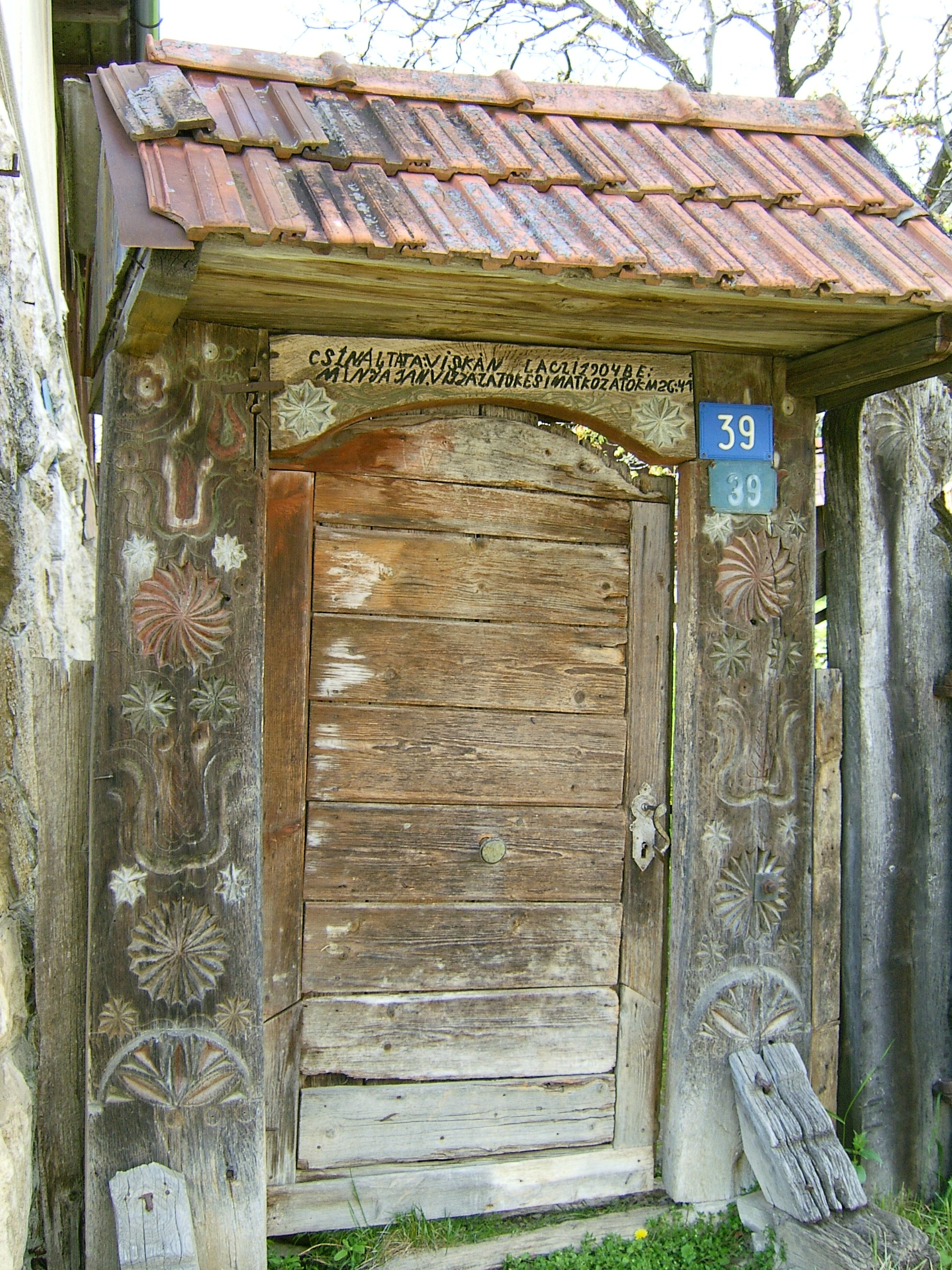 Kapu Nyárszón, Erdélyben